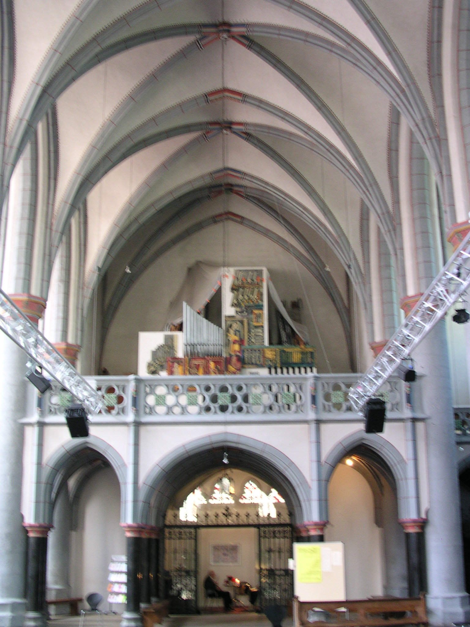 Aachen, Blick zur Orgel und zum Eingang der Nikolauskirche